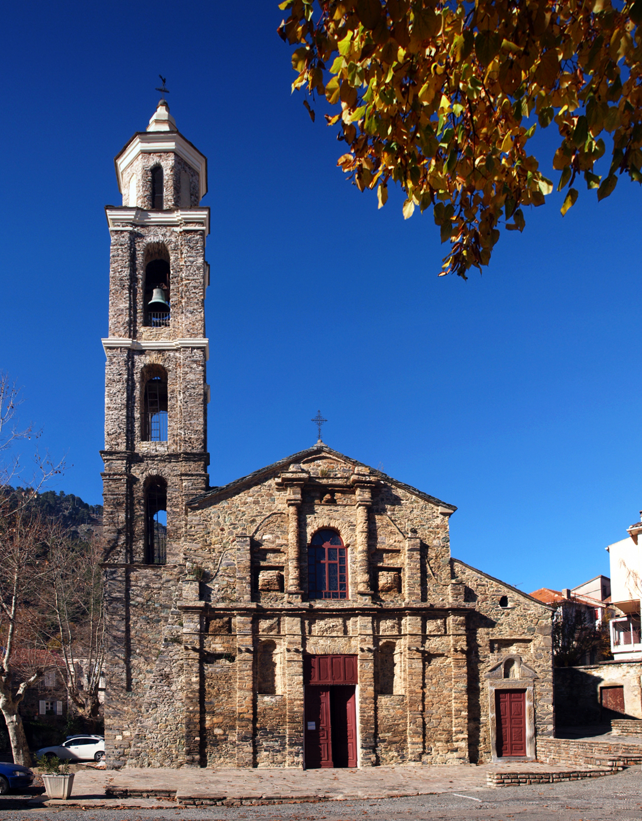 Vezzani (Corse) - L'église de L'Annonciation (XVIe siècle)